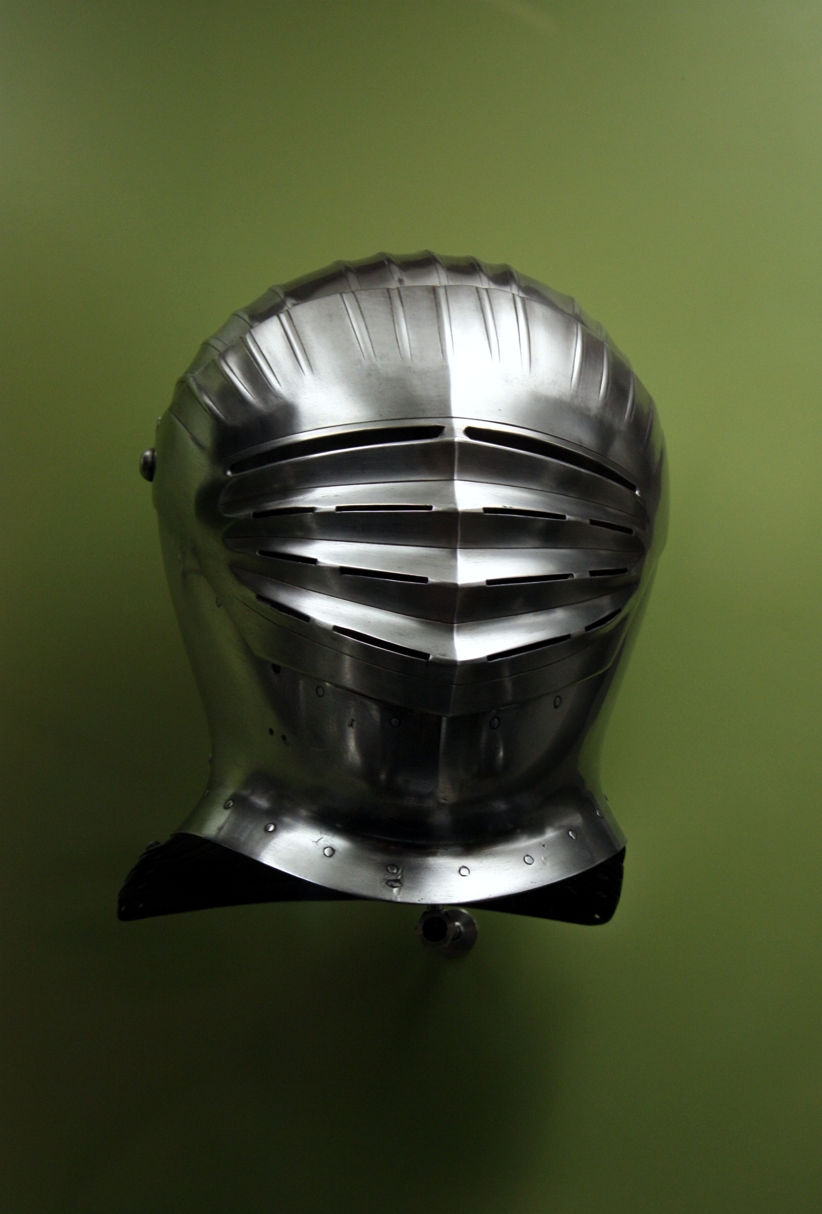 Heaume médiéval, musée du Cinquantenaire de Bruxelles, Belgique. Royal Museums of Art and History Native nameMusées royaux d’art et d’histoireLocationBrusselsCoordinates50° 50′ 26″ N, 4° 23′ 35″ E Established1835Website control VIAF: 312540662 ISNI: 0000 0001 2342 957X GND: 1006854-5 SUDOC: 162391722